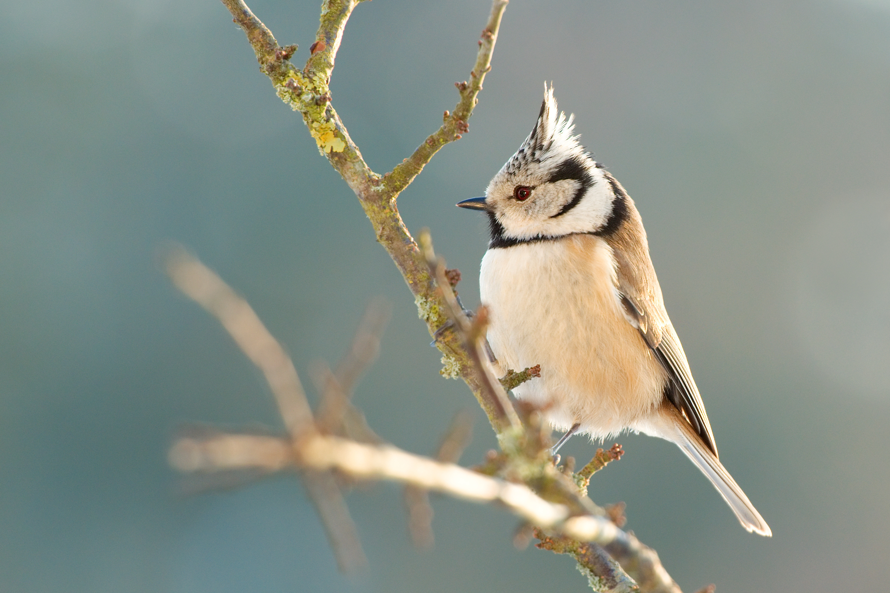 Mésange huppée Lophophanes cristatus more pictures: ¢ Luc Viatour